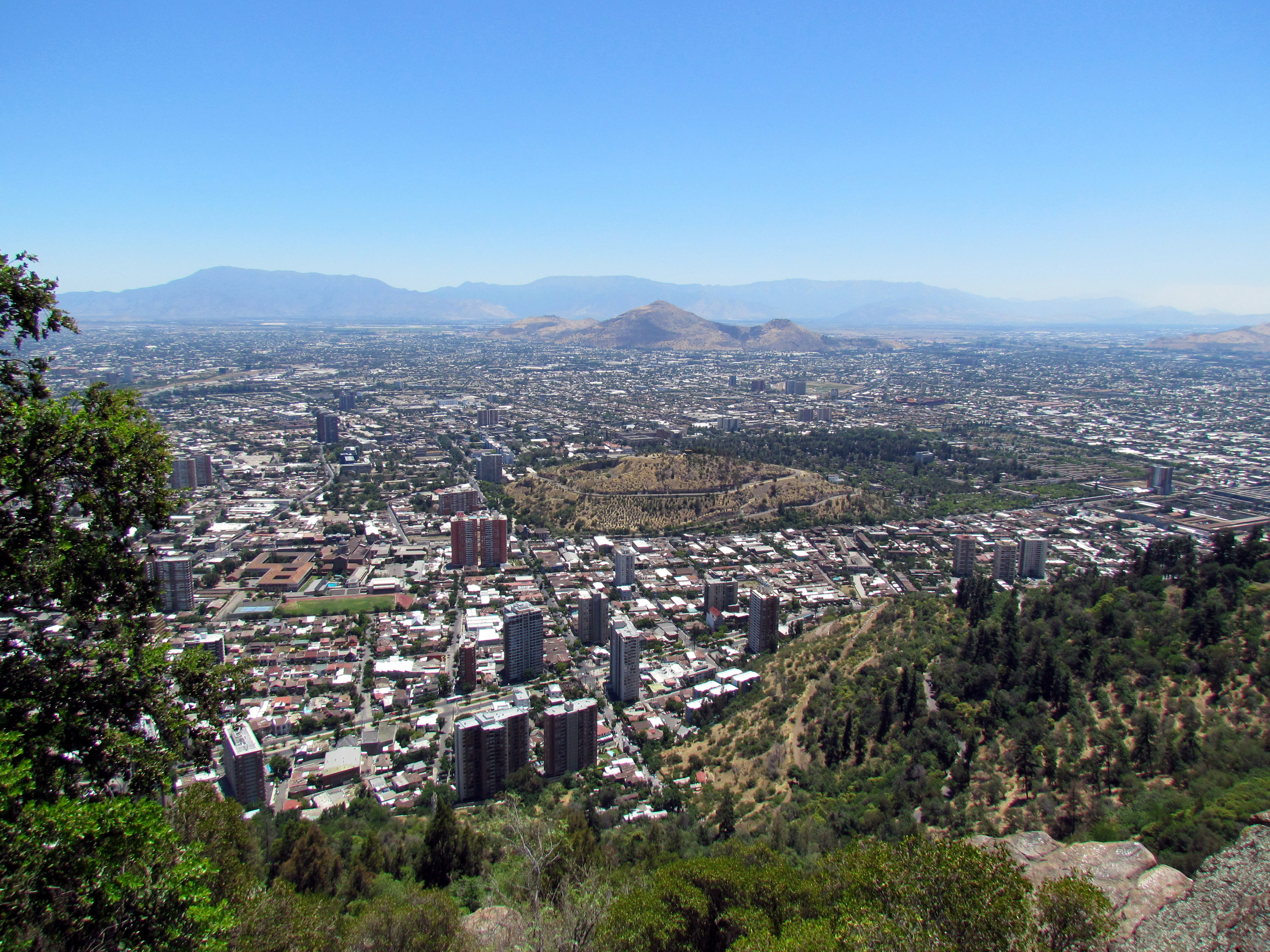 Vista de Santiago de Chile desde el Cerro San Cristóbal.